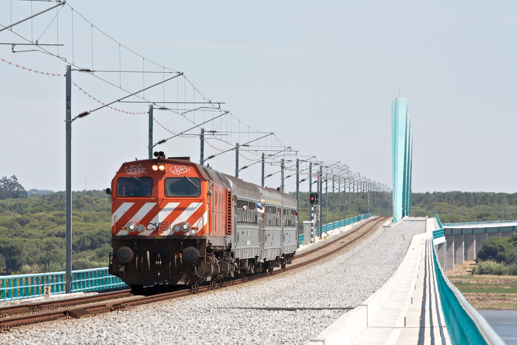 Tipo: Comboio Especial 13860 Portuguese Traction Group [Porto de Sines - Entroncamento] Local: Alcácer do Sal [Variante de Alcácer, PK 67] Data e hora: 1 de Julho de 2012 [16h01] Material: Locomotiva 1962 + 3 carruagens Sorefame fotografia publicada | photo published: Trainspo + RailPictures. gravação-de-campo | field recording link. video link. [PT] A locomotiva 1962 com um comboio especial de passageiros fretado pelo Portuguese Traction Group, no local mais cénico da Variante de Alcácer (a travessia do Sado). [ENG] CP 1962 with a Portuguese Traction Group special train, seen in the Alcácer Bypass' very nice-looking bowstring-arch bridge.